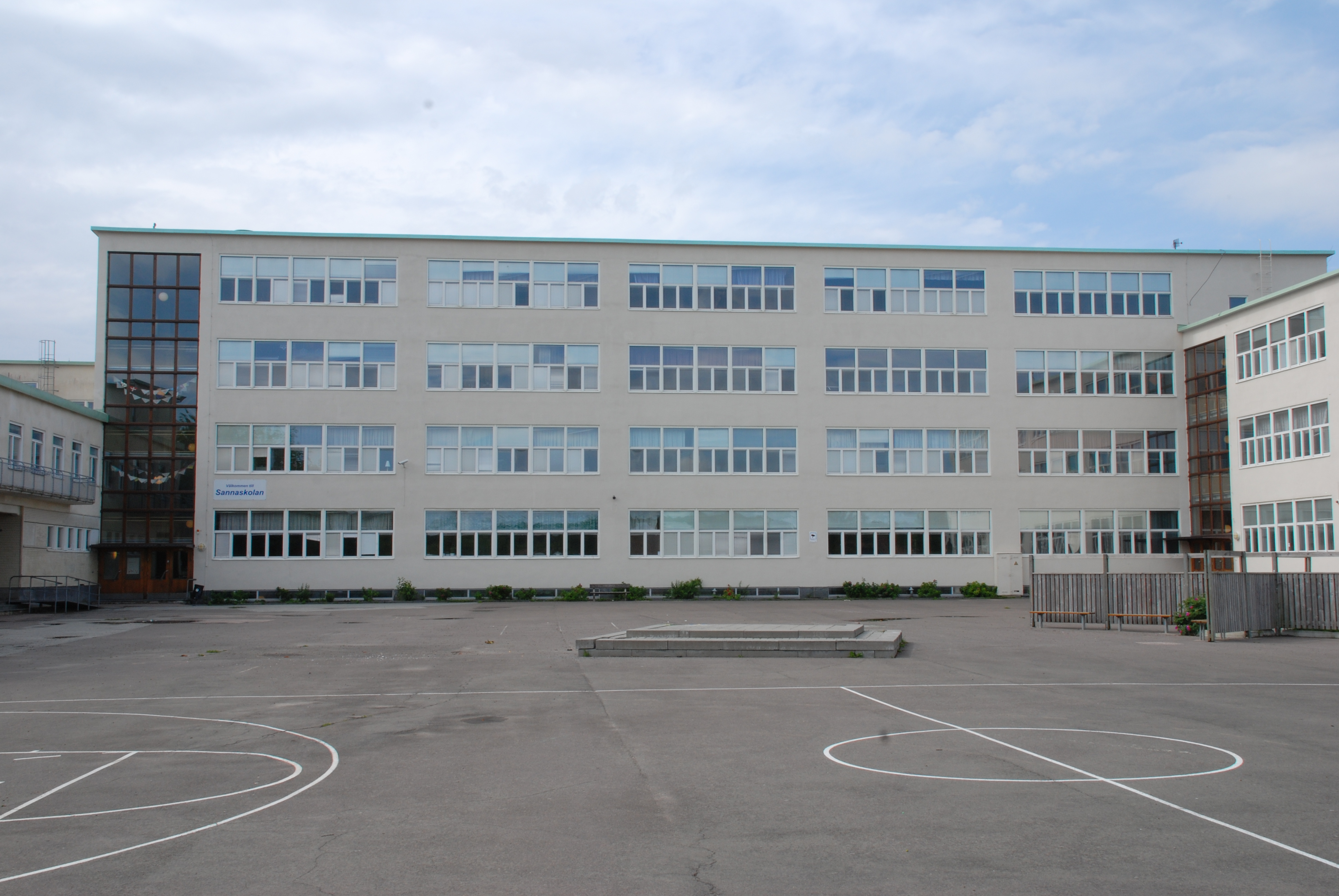 Sannaskolan i stadsdelen Sandarna i Göteborg. Uppförd 1941 efter ritningar av arkitekten Åke Wahlberg.